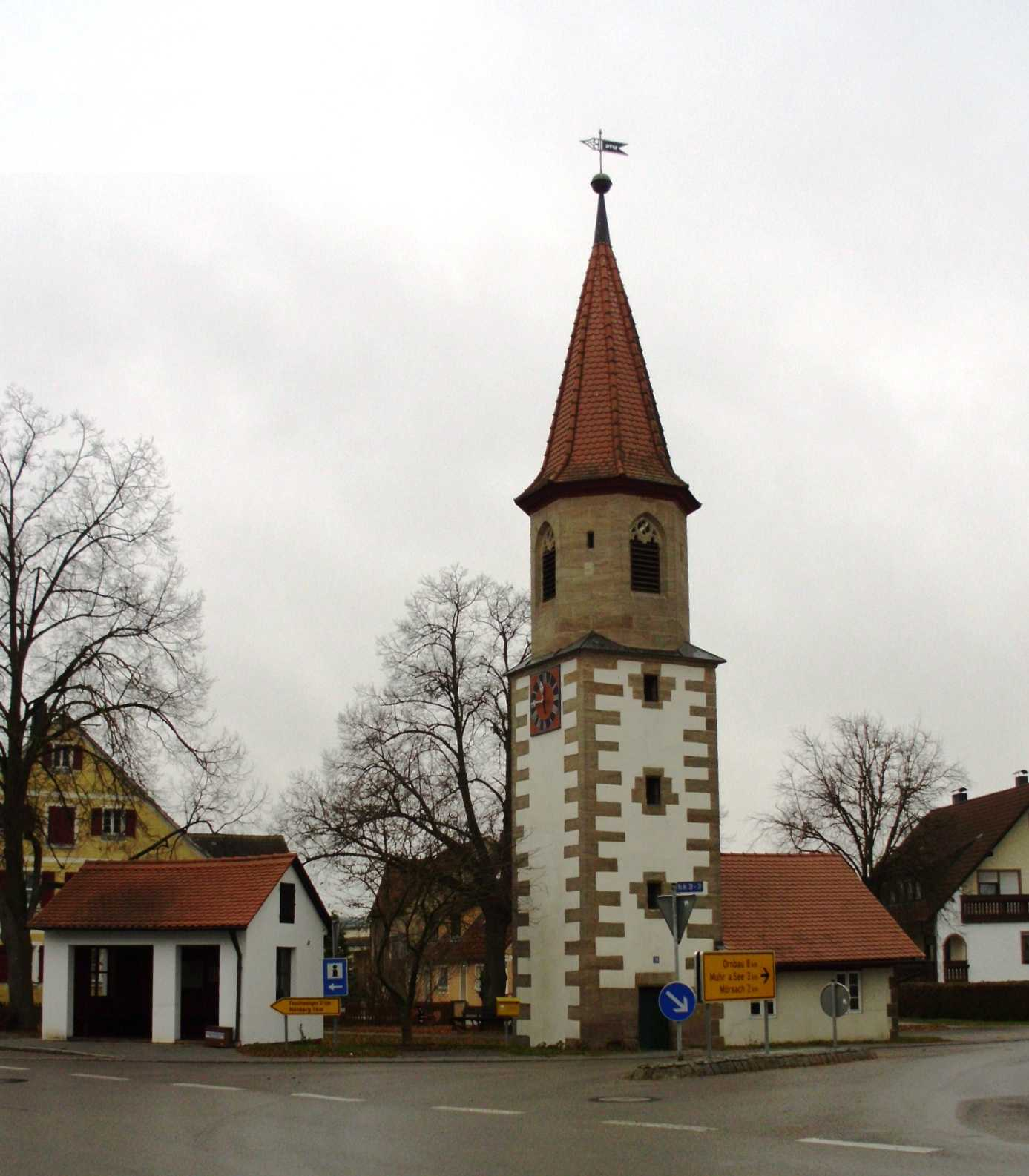 Glockenturm von Streudorf, Ortsteil von Gunzenhausen im Landkreis Weißenburg-Gunzenhausen, Bayern